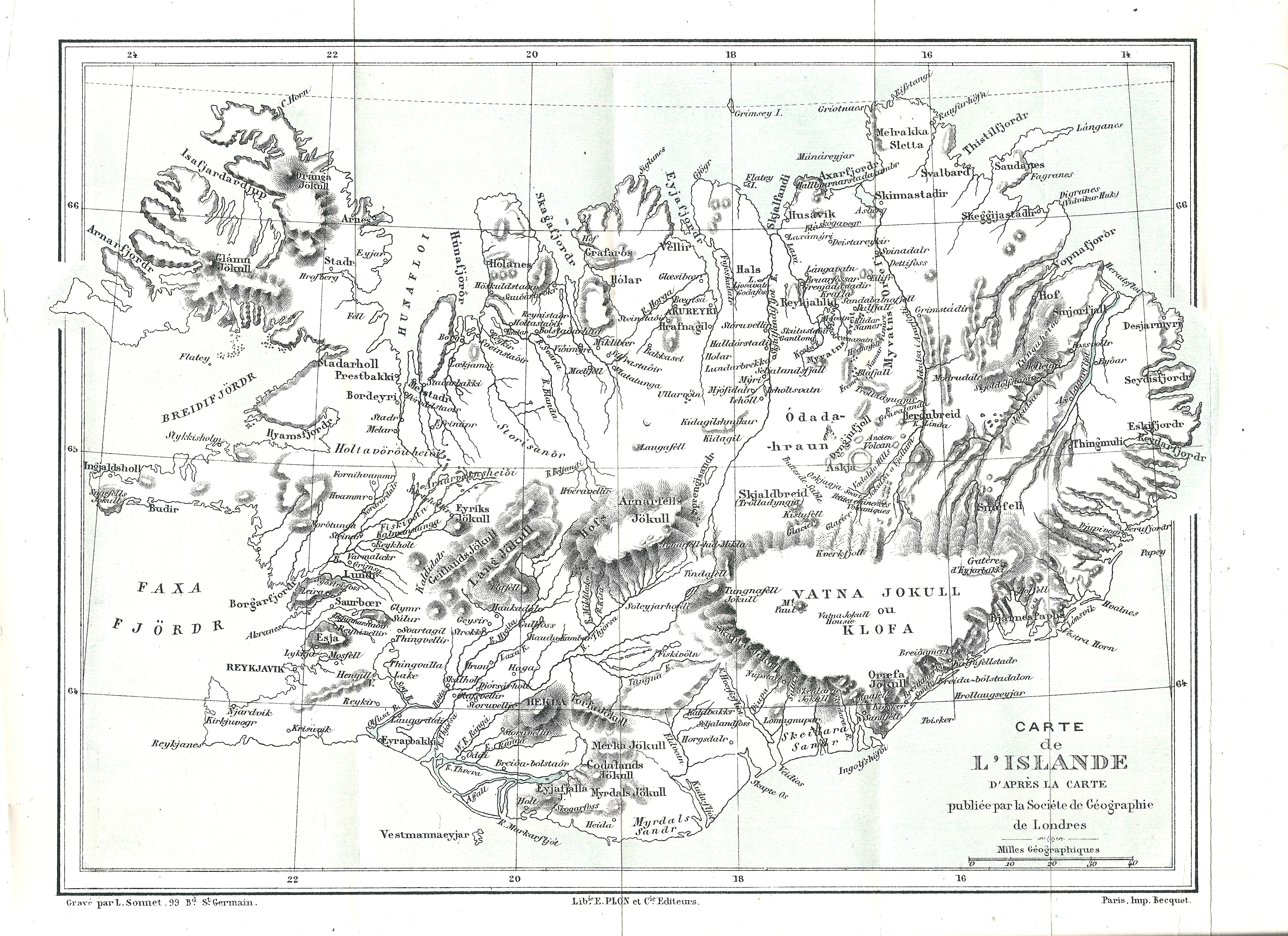 Carte de l'Islande dressée d'après la carte de la Société de Géographie de Londres et légendée en français.